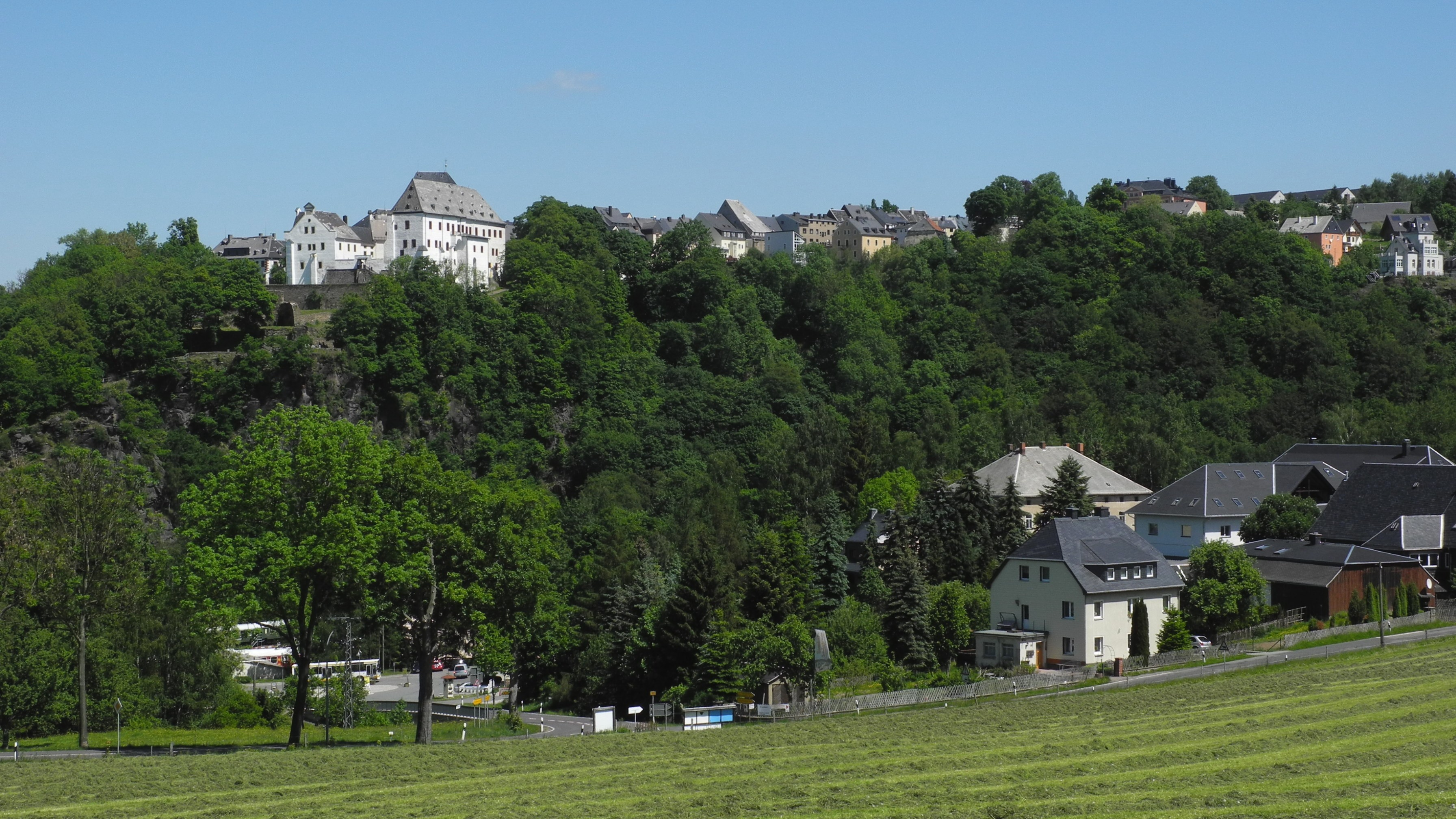 Wolkenstein - Sicht von der Wiesenbader Strasse